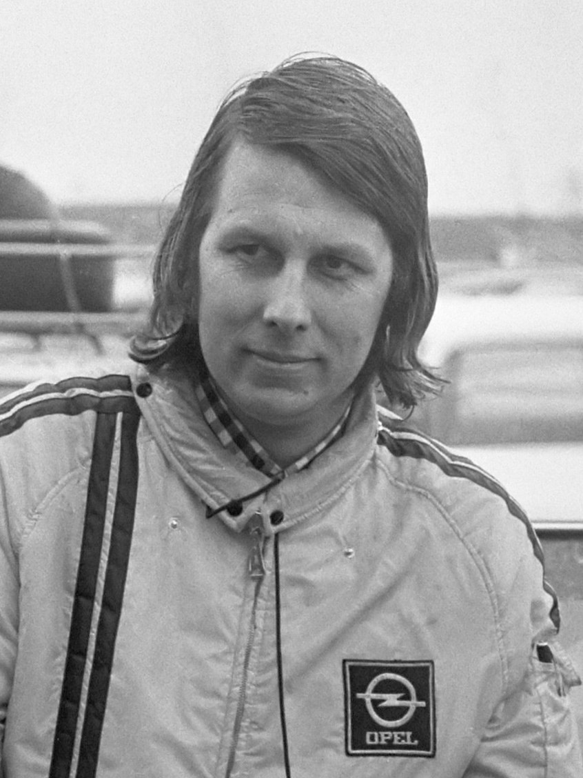 Tulpenralley, B. de Jong en B. Dolk eerste 5 mei 1973